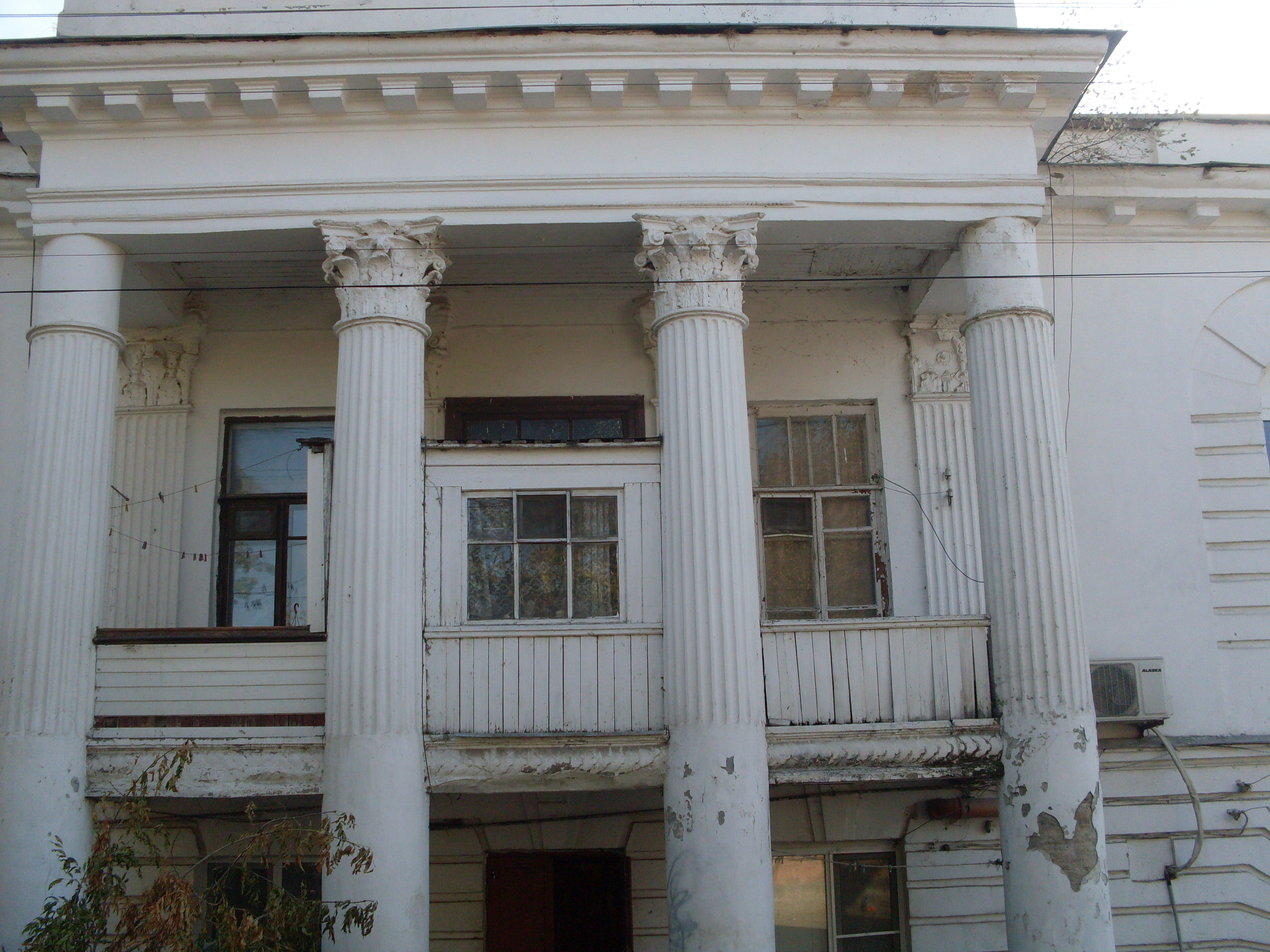 Жилой дом купца кирсанова. комплекс застройки улицы. (Ростовская область, Таганрог, чехова улица, 129)